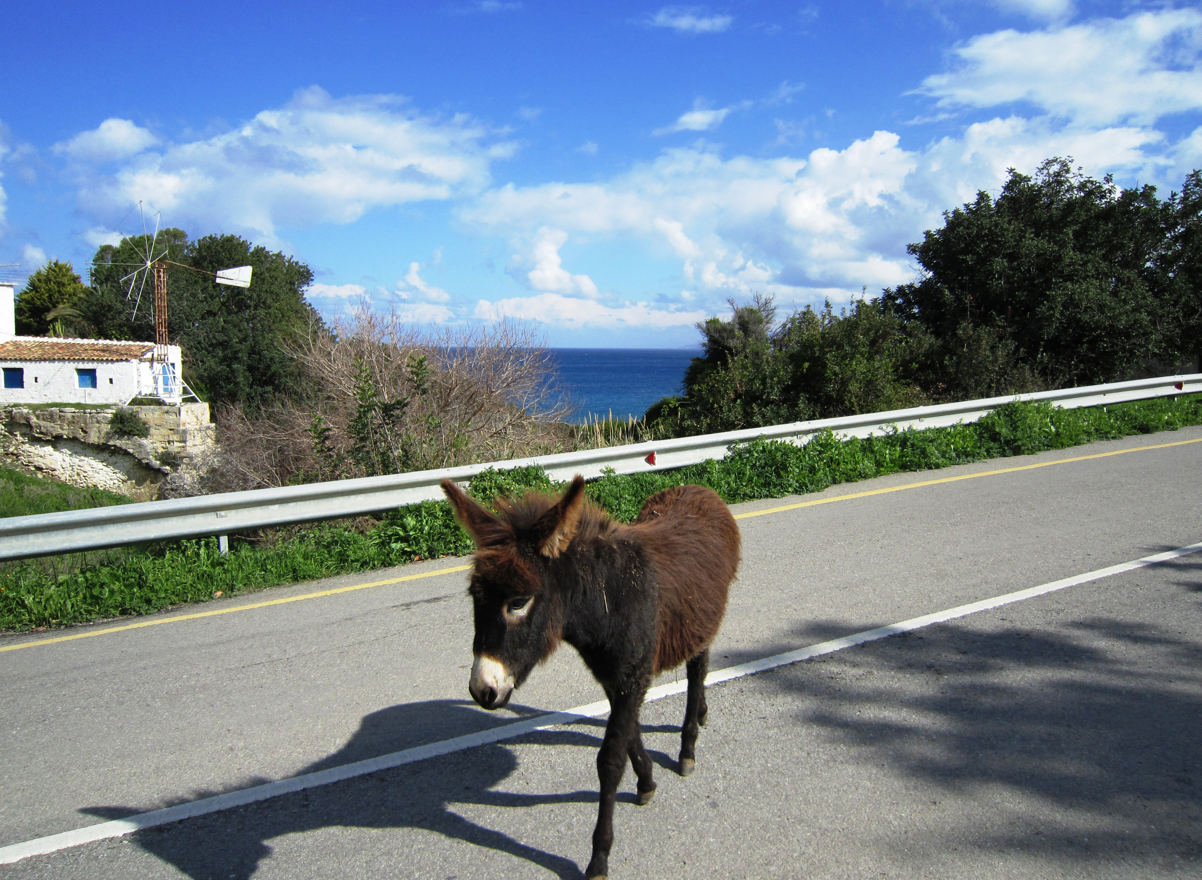 Wilde ezels op Cyprus